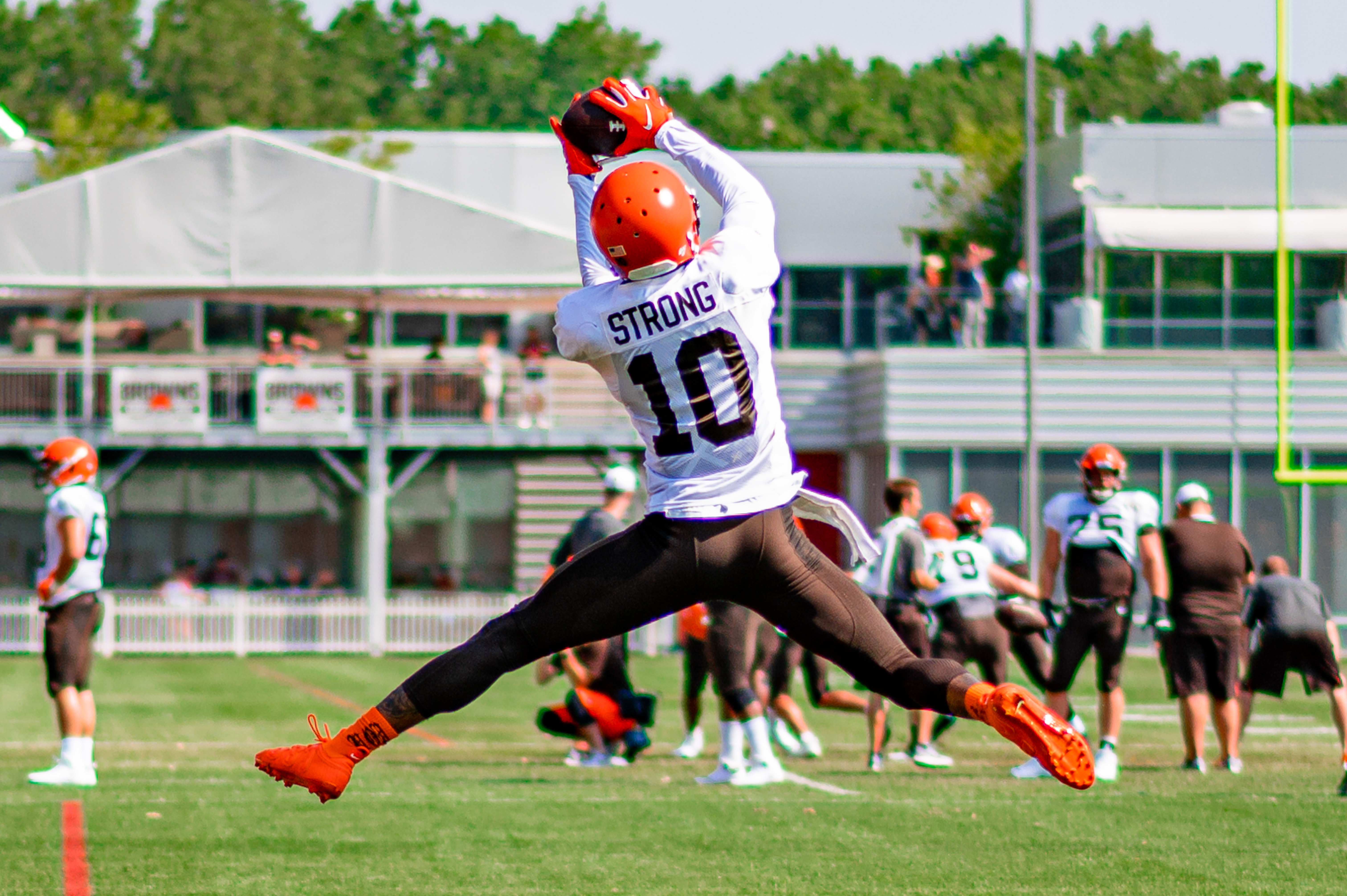 Jalen Strong